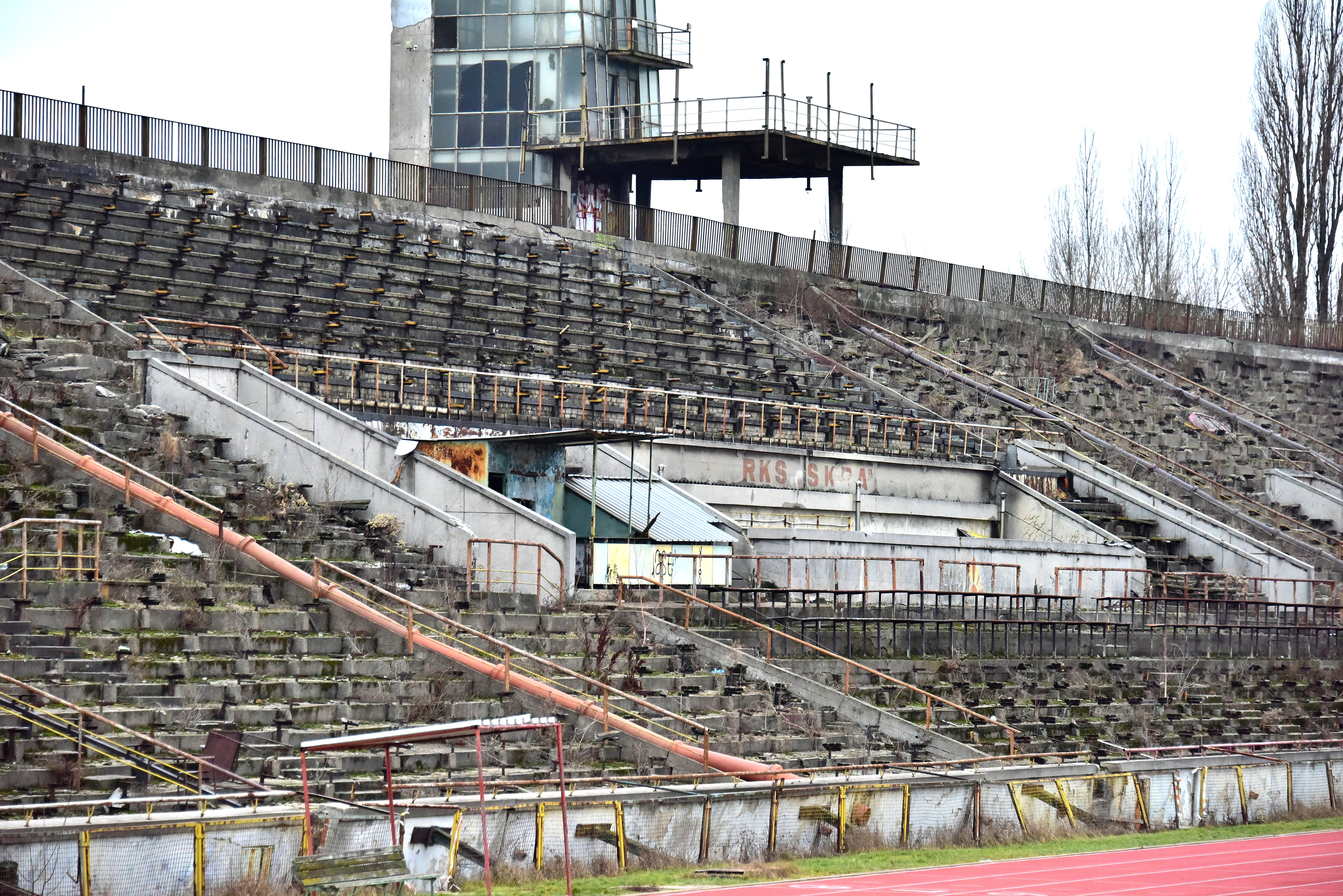 Stadion RKS Skra w Warszawie